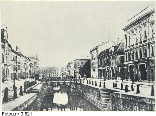 Västra Hamngatan med kanal. Korsningen med Kungsgatan syns efter bron; träden till höger på bilden står på Domkyrkoplan. Kanalen lades igen 1903-1905. Fotou.nr:0:521 Bron är Vallgatubron.